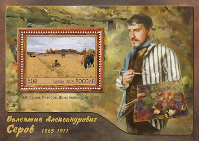 Почтовый блок России 2015 года, посвящённый 150-летию со дня рождения Валентина Александровича Серова с изображением портрета художника и его картины «Октябрь. Домотканово» (1895, хранится в Государственной Третьяковской галерее). Художник — О. Н. Иванова. № 1909 по каталогу ИТЦ «Марка». Тираж — 70 тыс. экз.